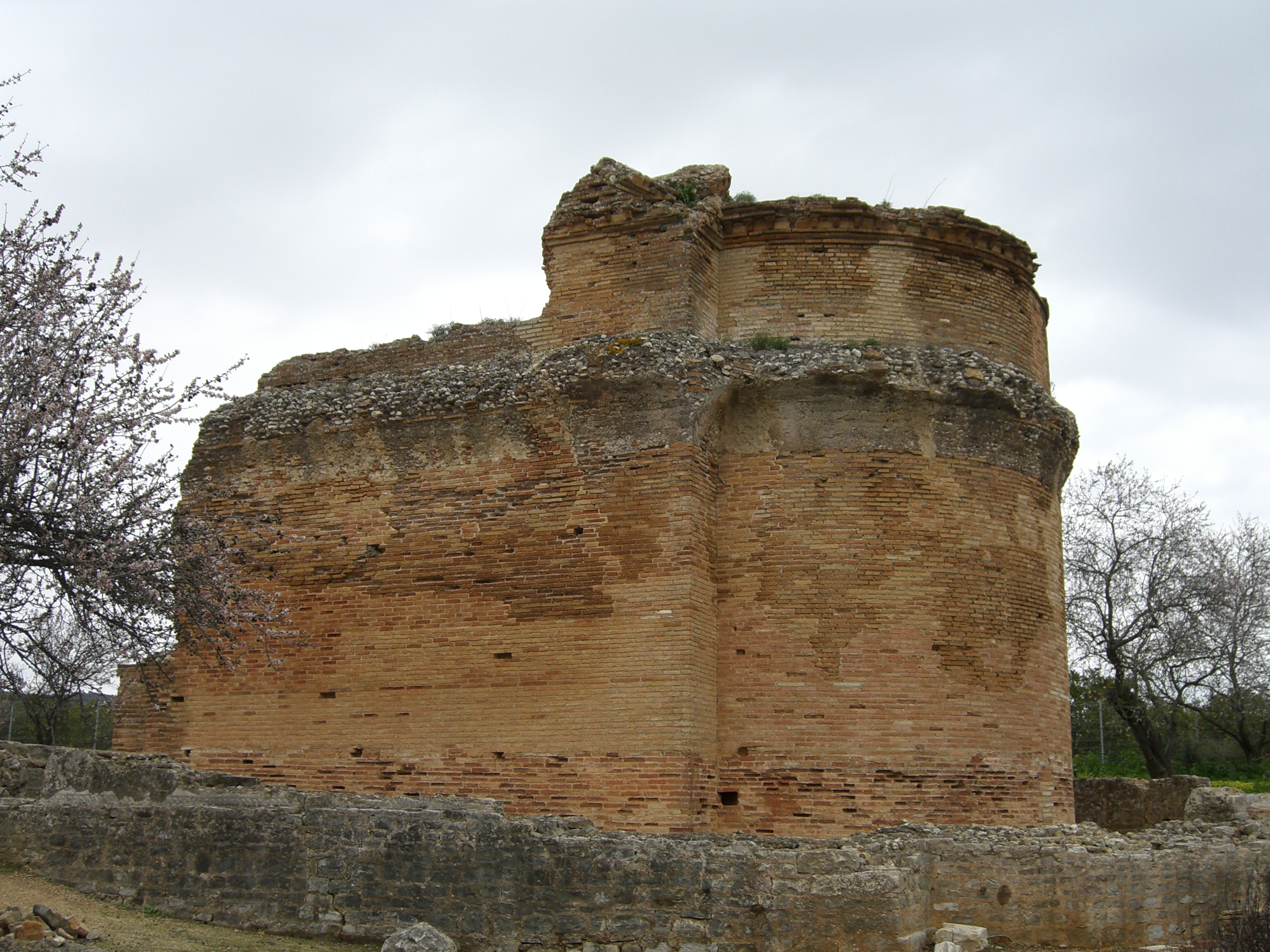 Ruinas romanas de Milreu, no concelho de Faro, Algarve, Portugal Fonte - Próprio autor